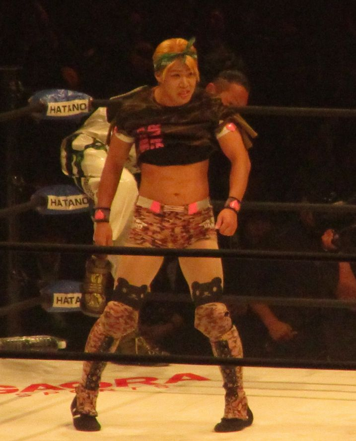 2016.11.3大阪